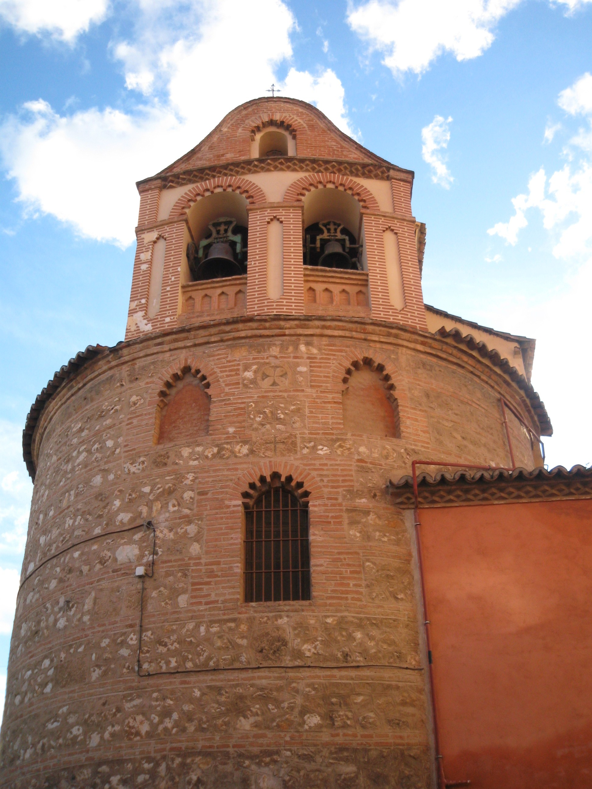 Santuario de Nuestra Señora de la Antigua in Guadalajara, Spain